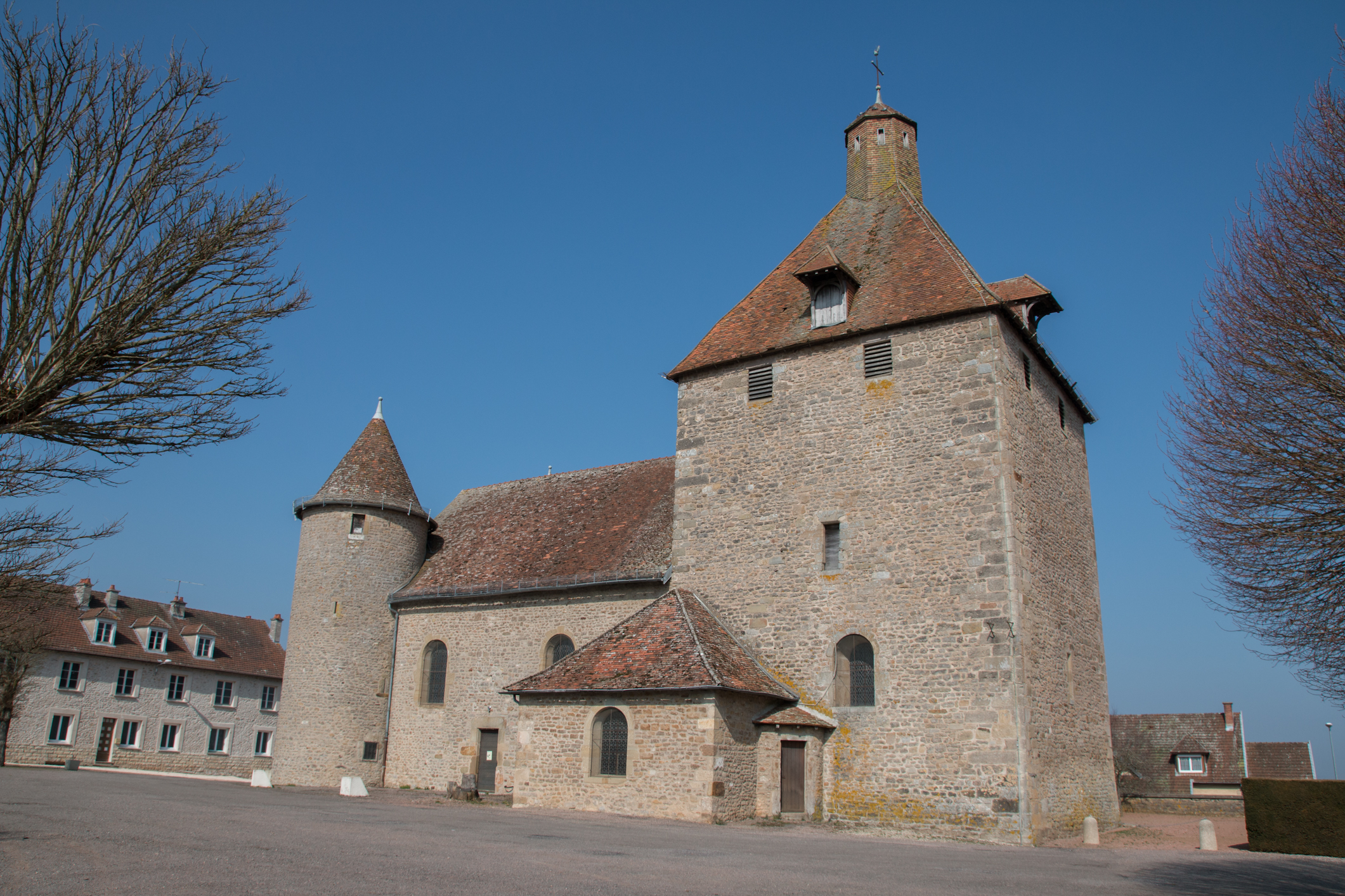 Preĝejo de Manlay